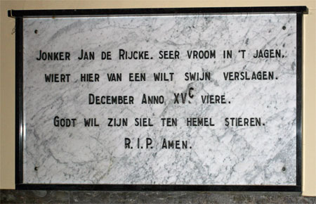 Buggenhout gedenksteen, eigen foto september 2004, hiermee onder GFDL gebracht